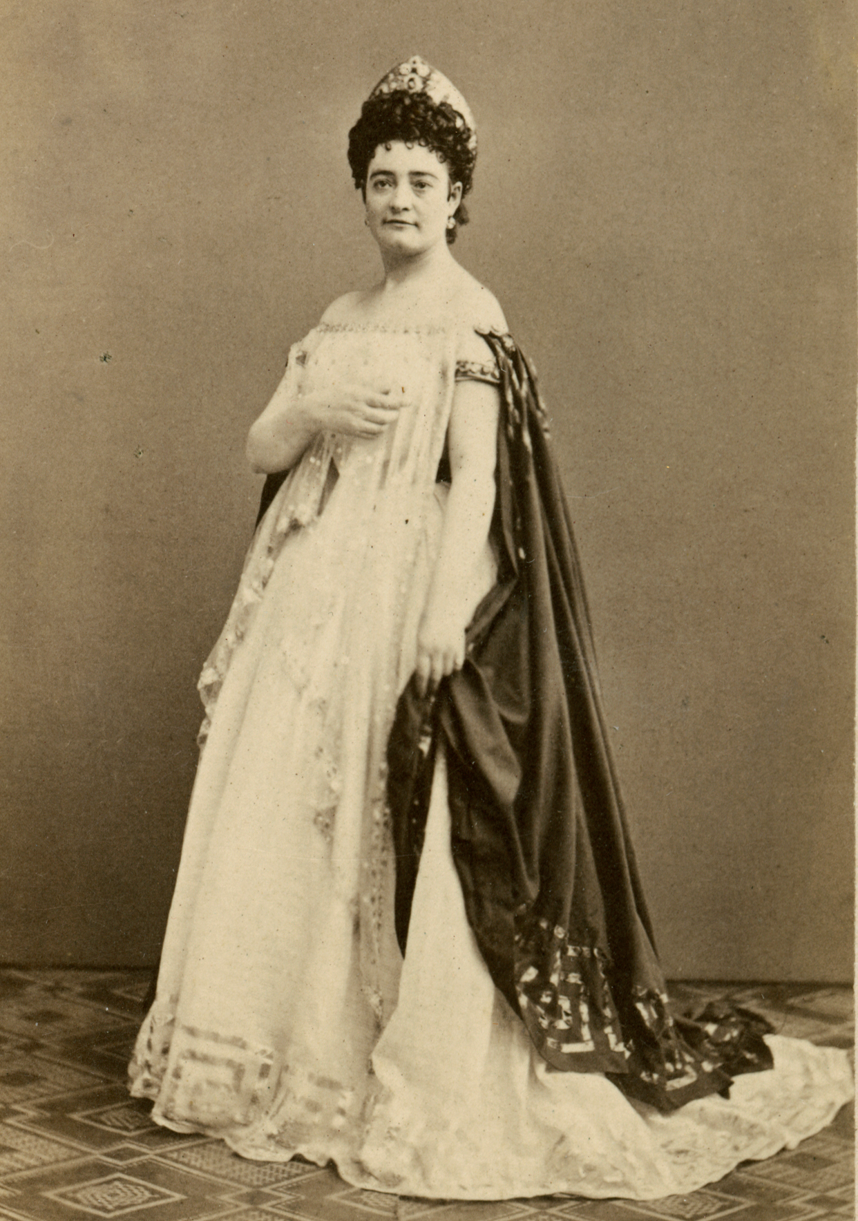 Strandberg, Albertina Josefina Charlotta f. Linderoth (1830-1913) i titelrollen. Den sköna Helena (La belle Hélène), Kungliga Dramatiska teatern 1865